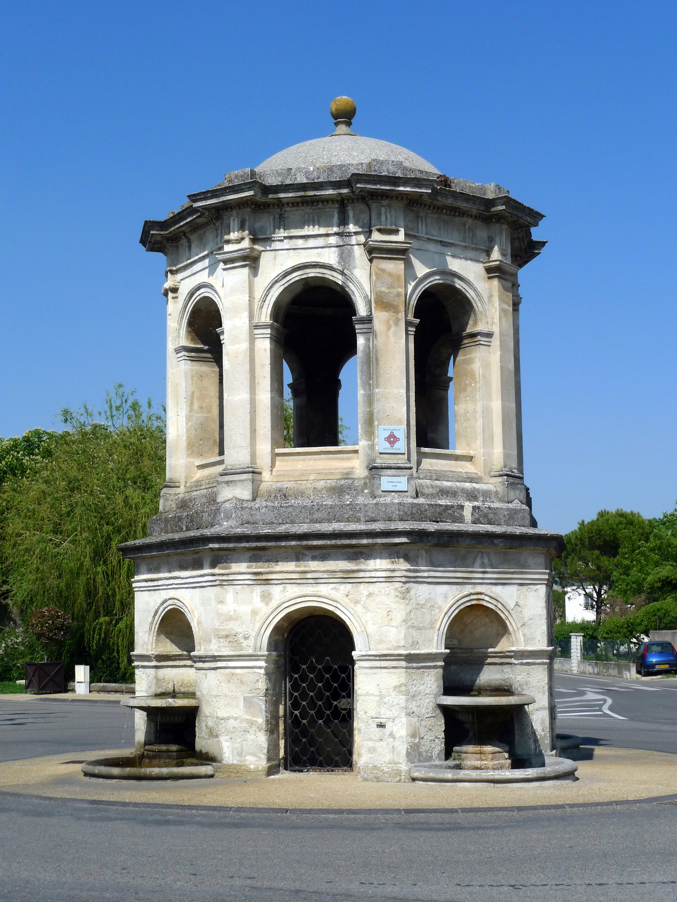 Fontaine de Bédarridesfontaine, château d'eau (Inscrit) .